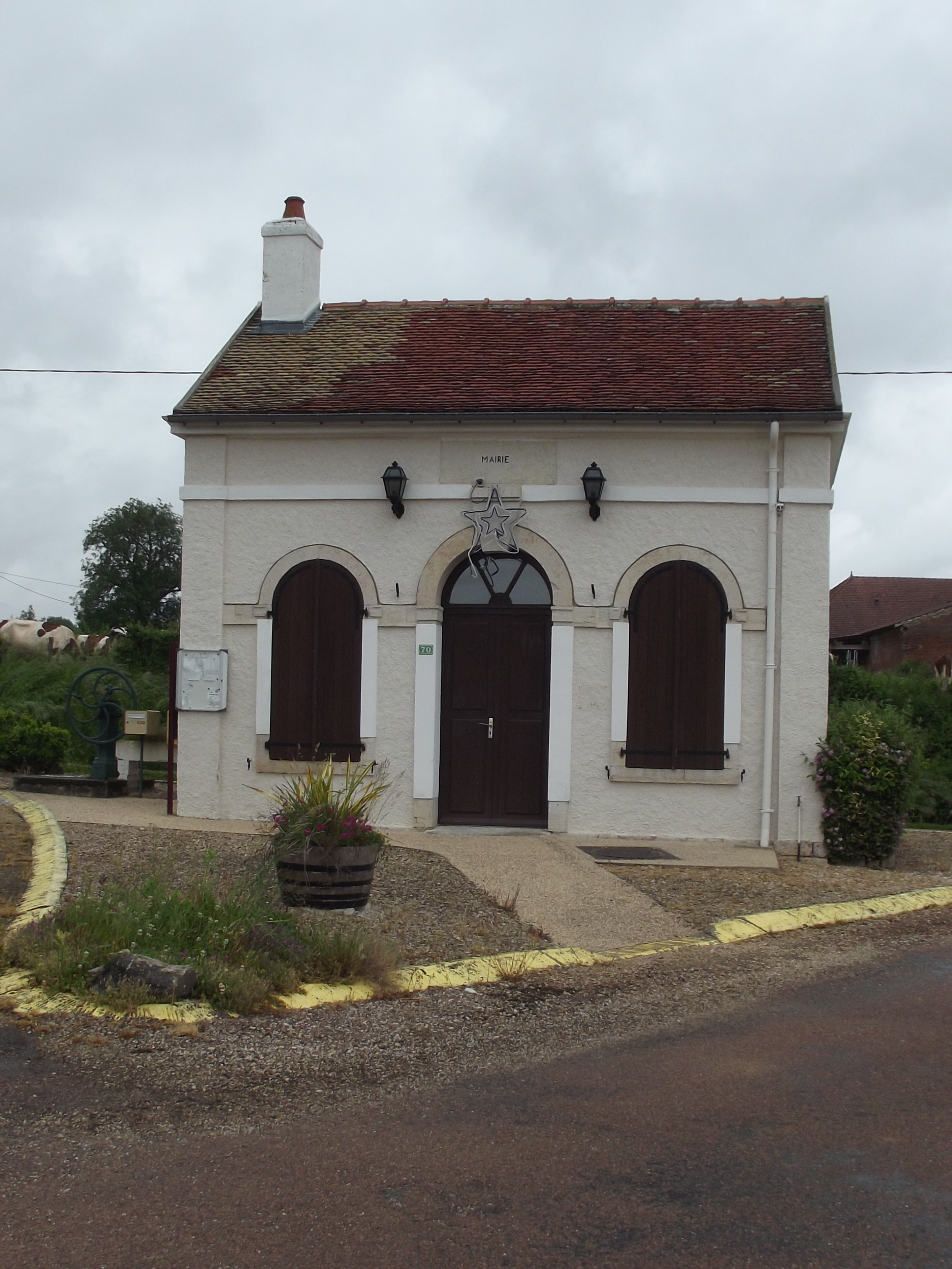 Das Gebäude der Mairie von Clux, in Betrieb bis zur Fusion mit der Gemeinde La Villeneuve per 1.1.2015